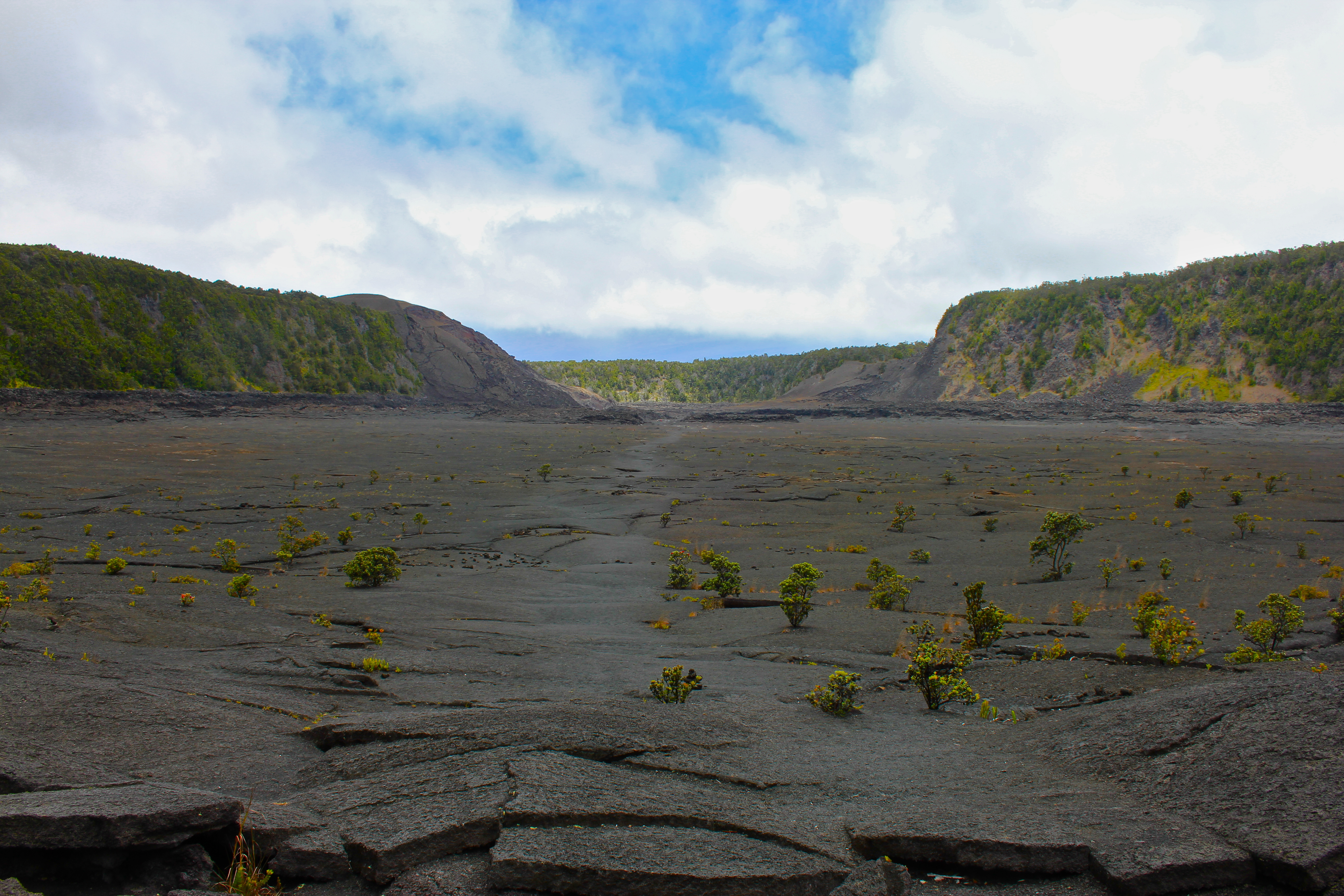 Kilauea Iki Trail, Volcanoes NP